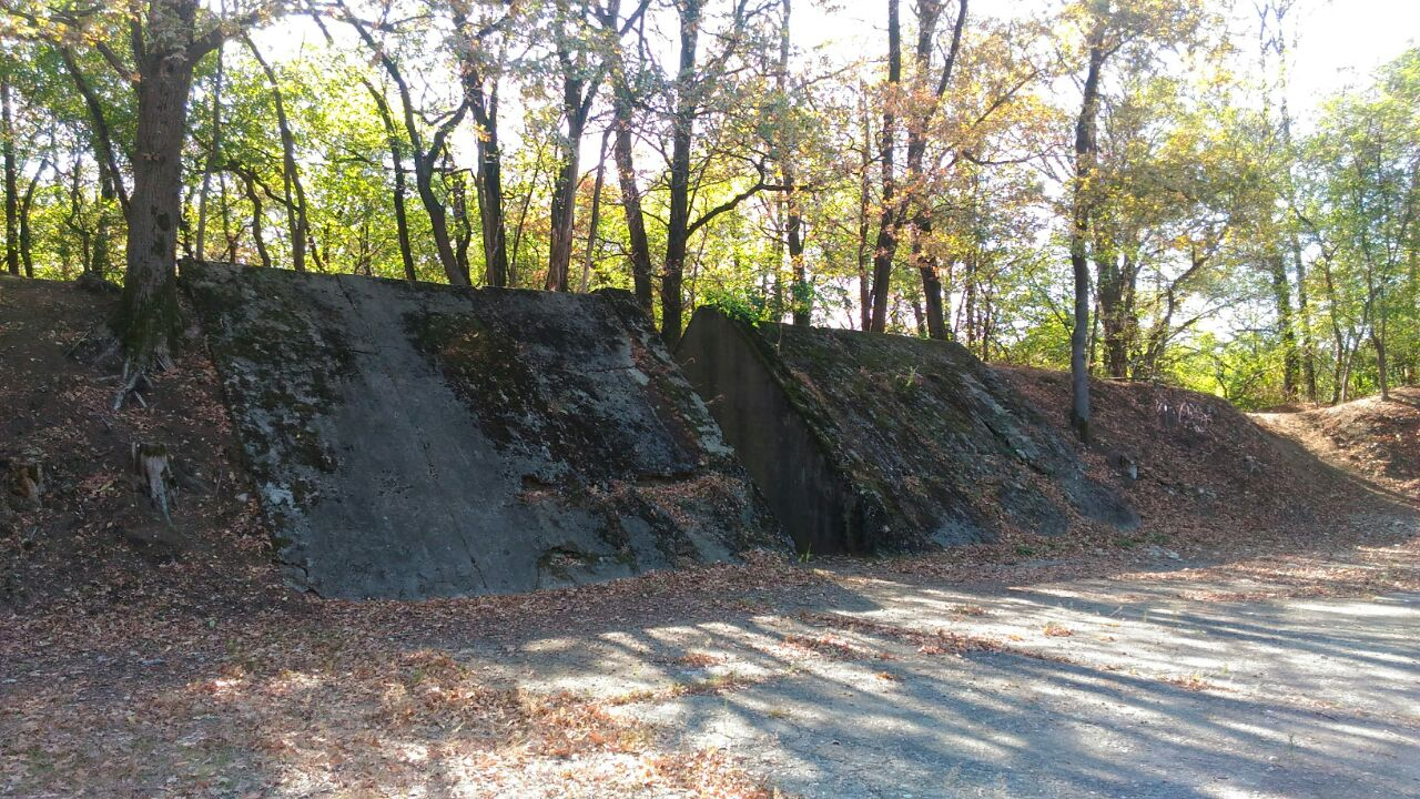 Muro paraschegge nella zona di via Gaggio a Lonate Pozzolo.